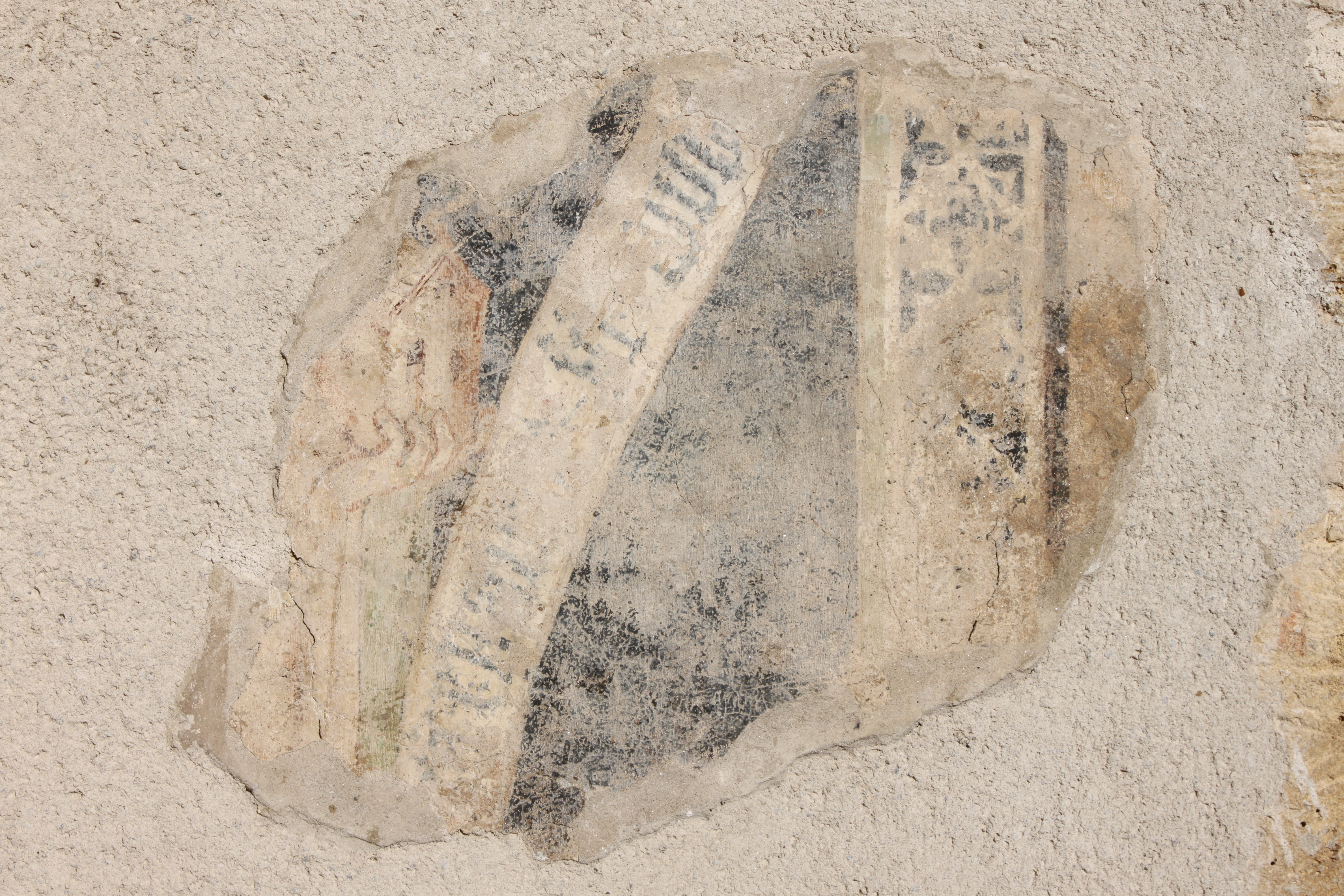 Kath. Pfarrkirche hl. Johannes der Täufer, Außenwand des Treppenturmes, rechts vom Hauptportal, Freskenrest Hand mit Kirchengebäude und Schriftfragmente von Johannes Aquila